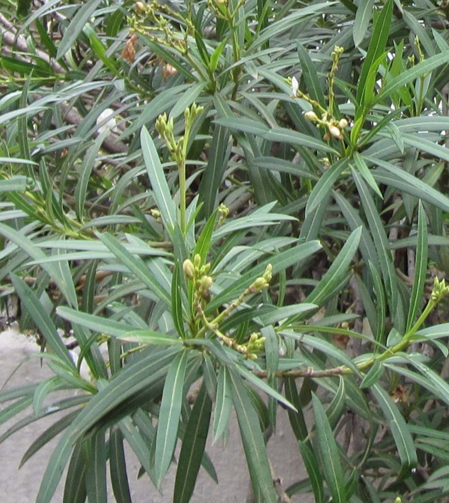 அலரி மலரின் இளமைப் பருவங்கள். 'Alari' flowers before blossom.